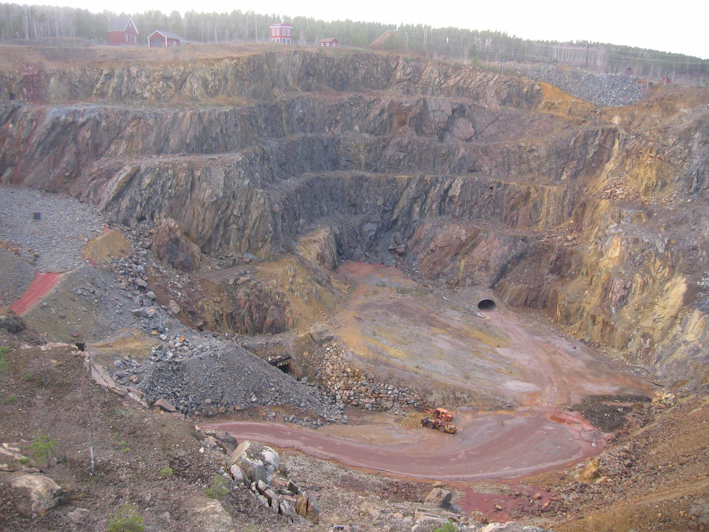 Stora Stöten, Falu Koppargruva. Fotografi taget av mig själv, 2006 Stora Stöten, Falu Koppargruva. Photograph taken by me, 2006